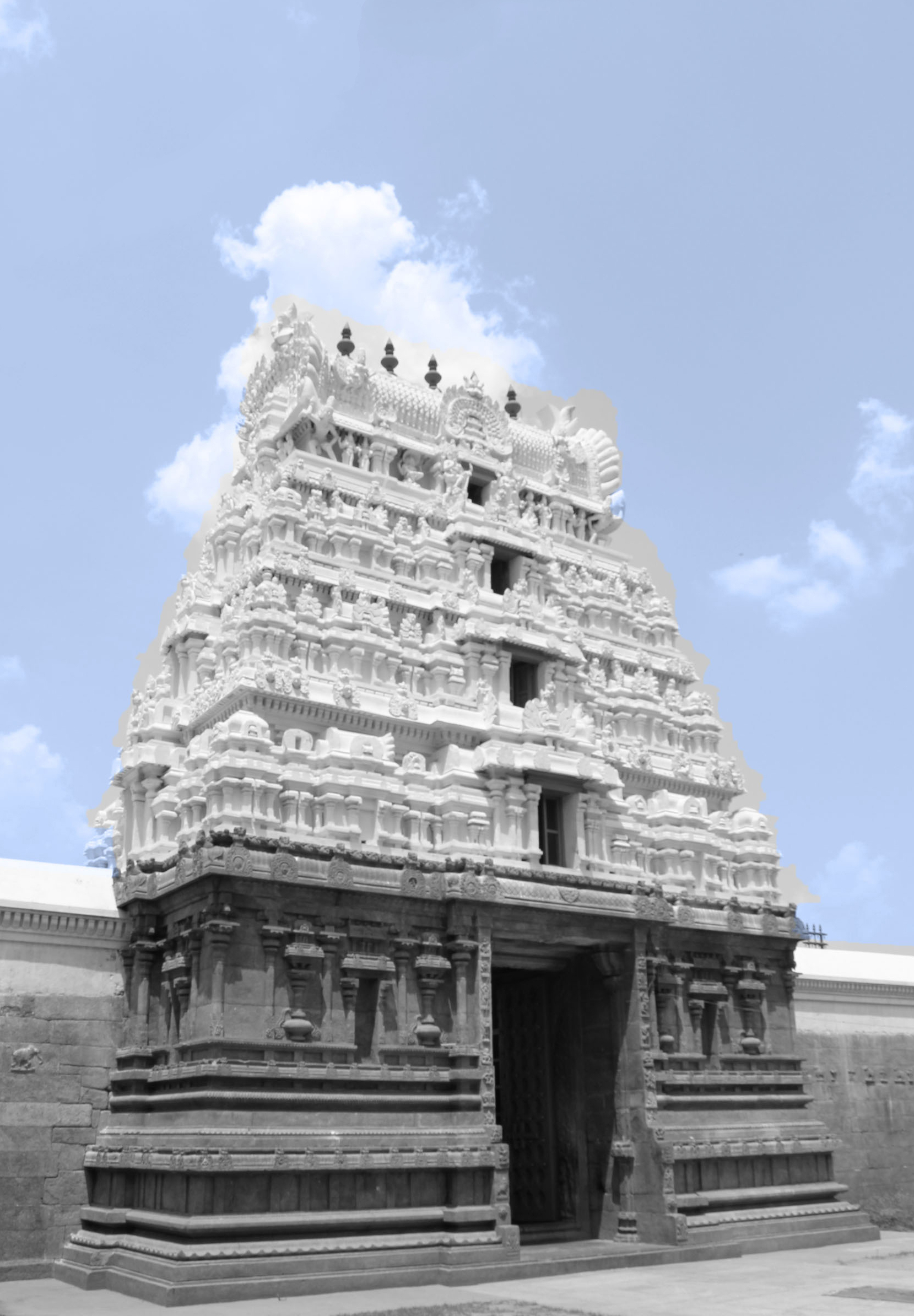 ஜலகண்டேஸ்வரர் வேலூர் மாவட்டத்தின் சிறப்புவாய்ந்த கோவிலாகும்